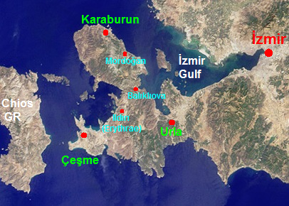 Karaburun peninsula, İzmir, Turkey.